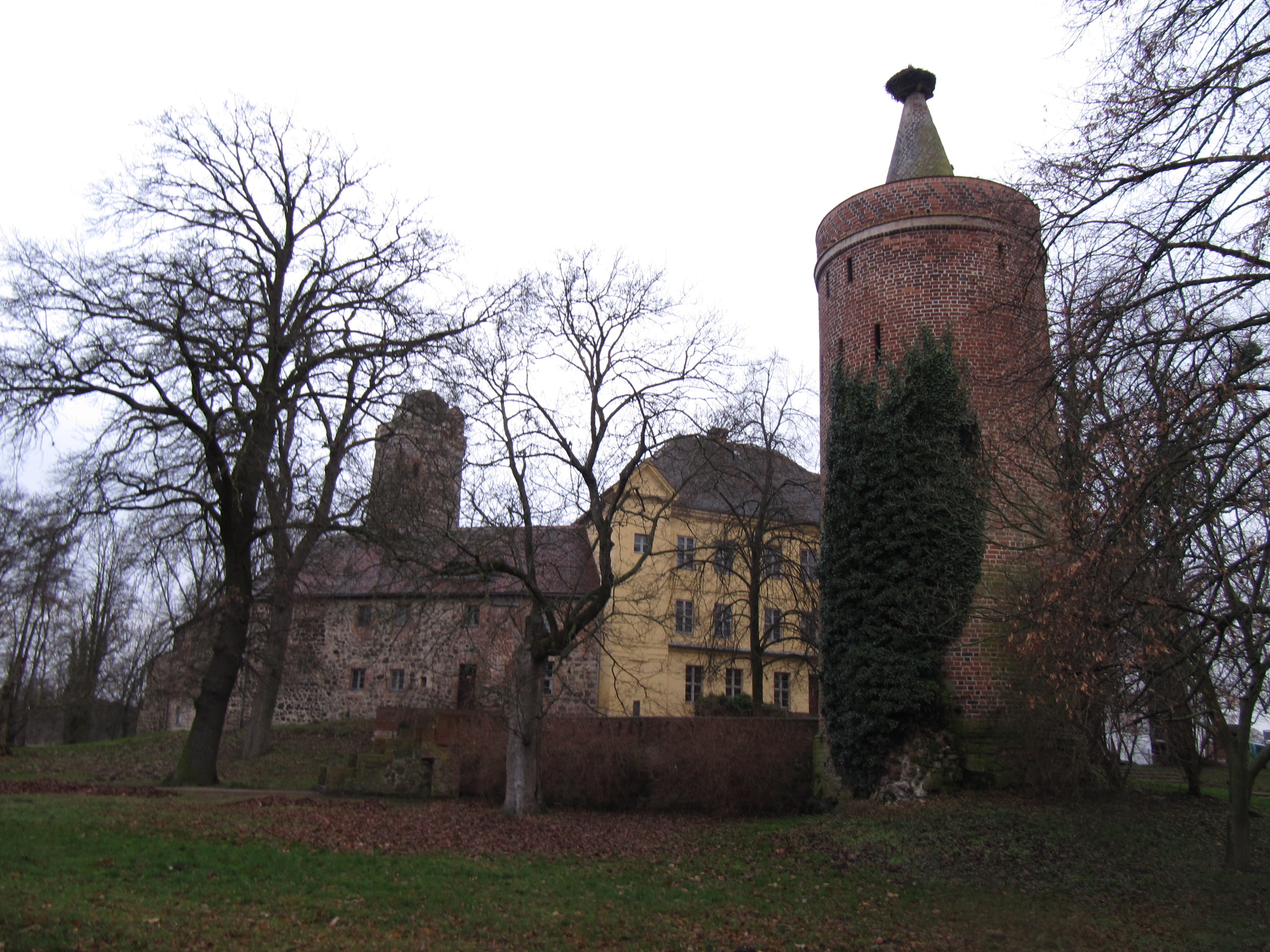 die burg ziesar von nordosten, rechts der storchenturm